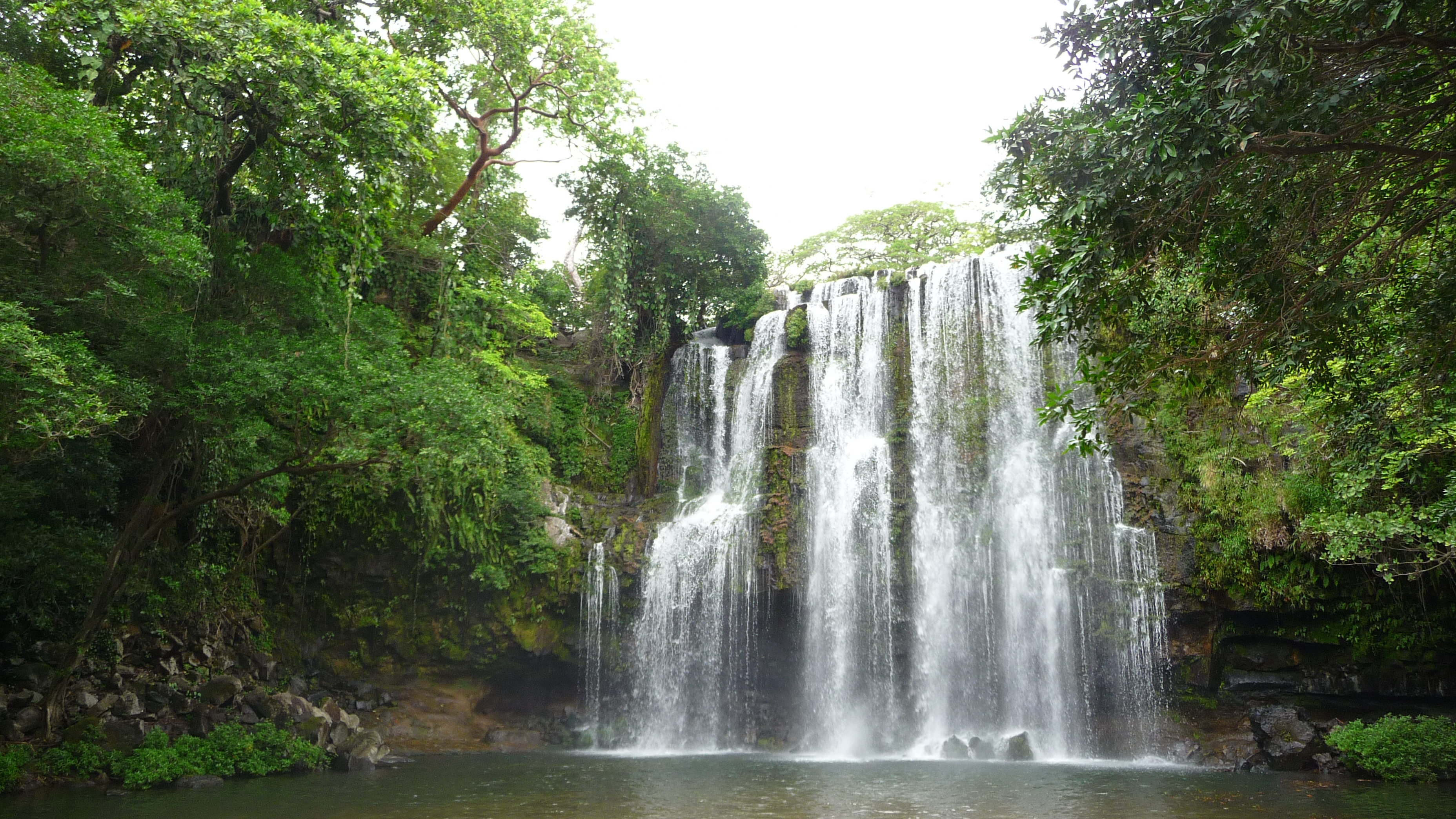 Chute d'eau du Costa Rica - Guanacaste